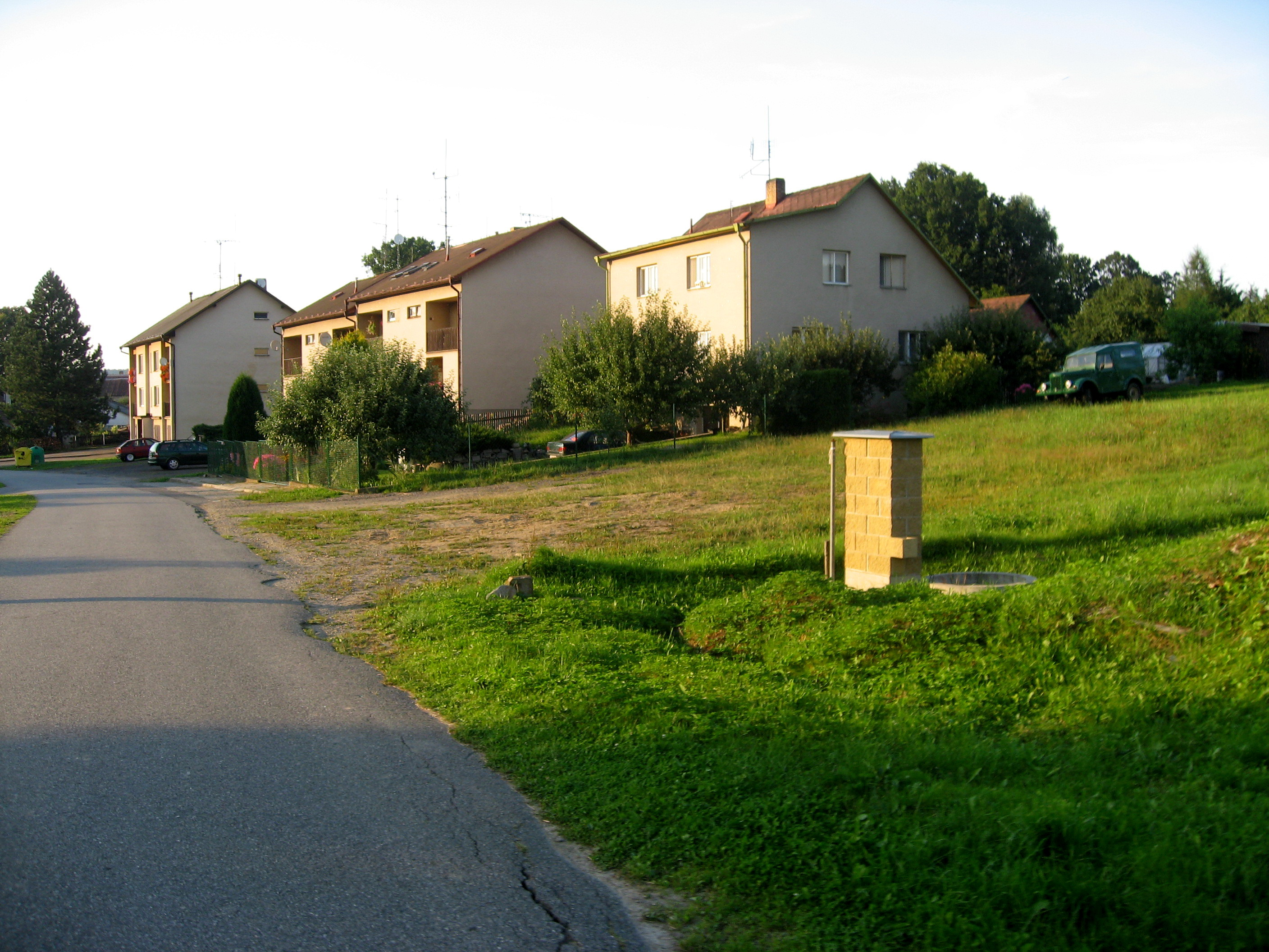 Velký Rybník